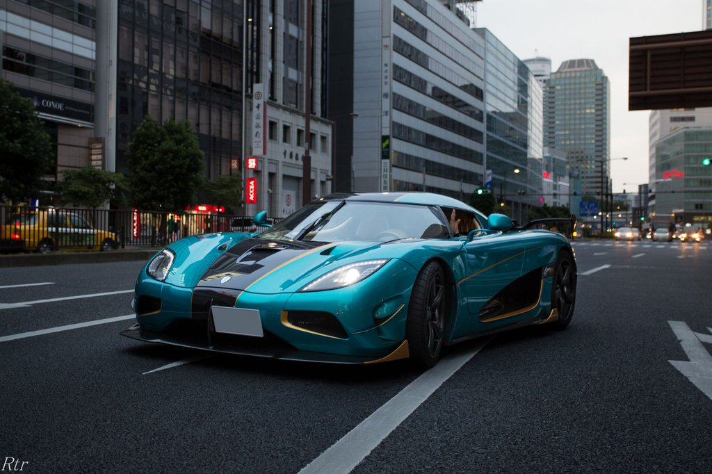 super car